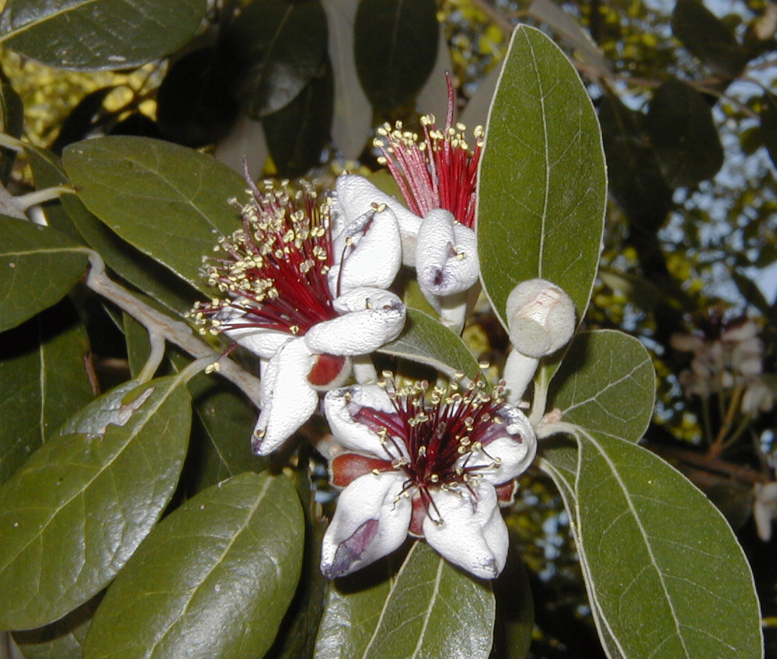 Acca sellowiana. Real Jardín Botánico, Madrid.